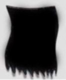 a black flag